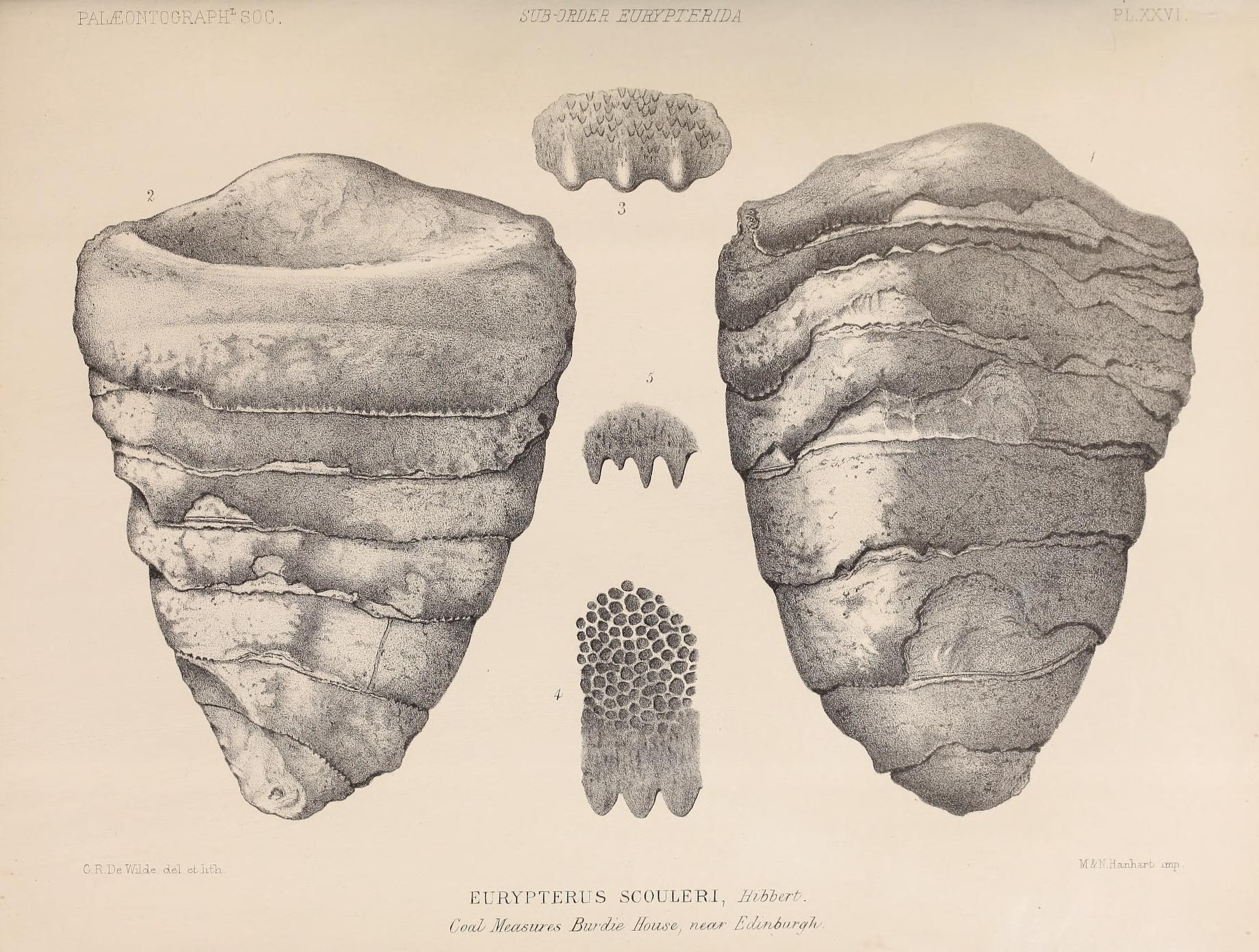 is r^ V U o ■£* c- ^ ft rQ ^. 1 1—1 1 P5 s; H ^ s." £ S o o 1 CO c/3 1 Oh § ^ .- § tf ^ ^ -^ y ft ^.